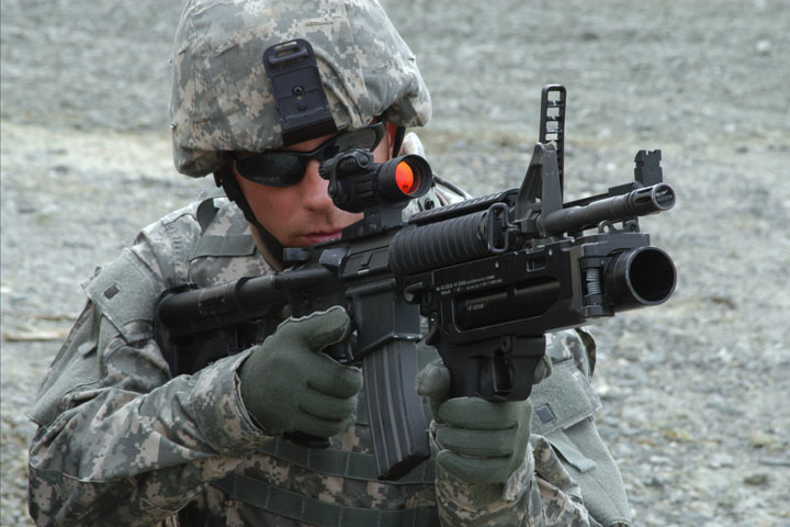 Grenade launcher XM320